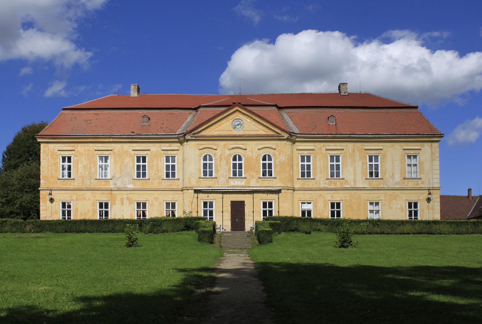 barokní zámek